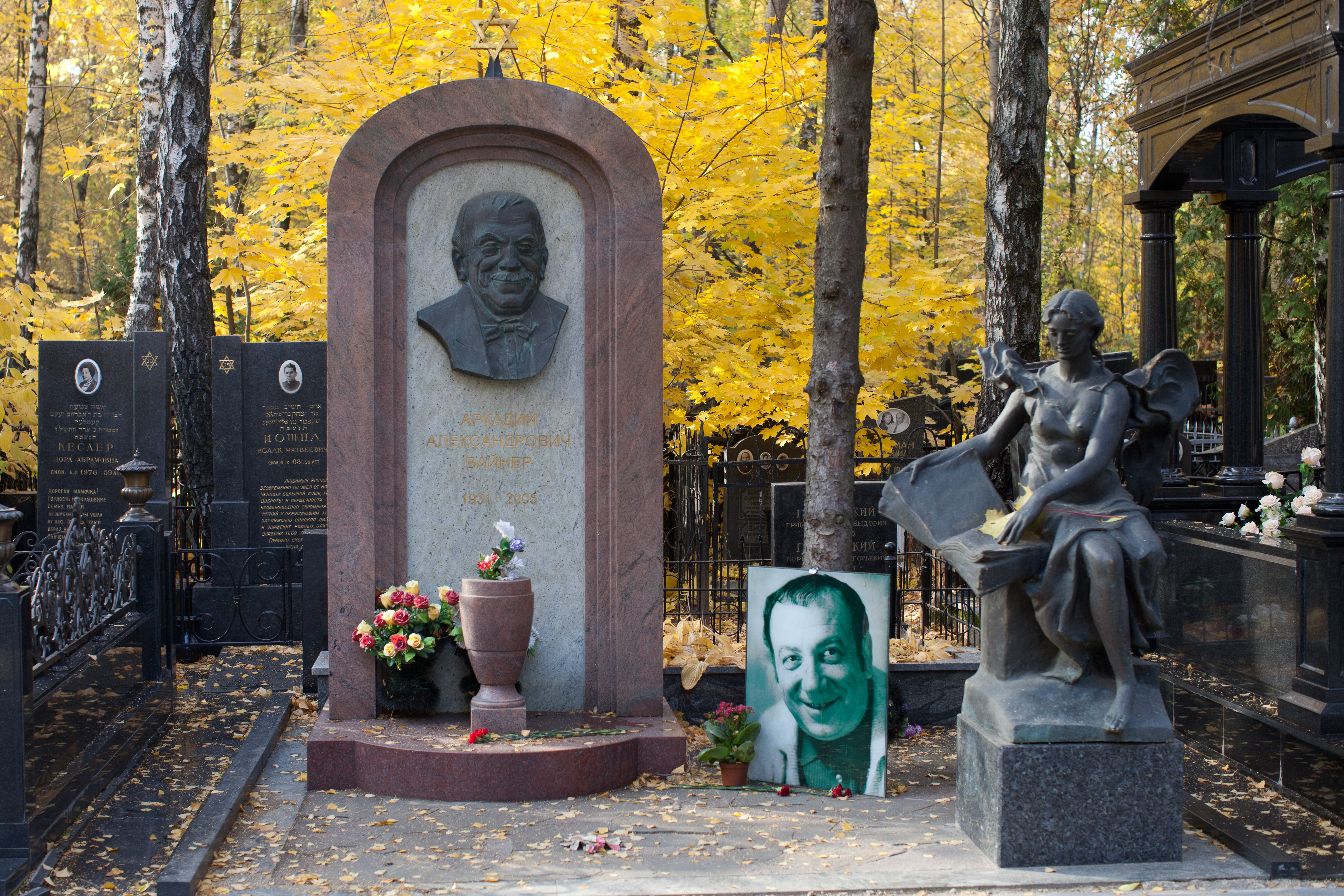 Могила писателя Аркадия Вайнера на Востряковском кладбище